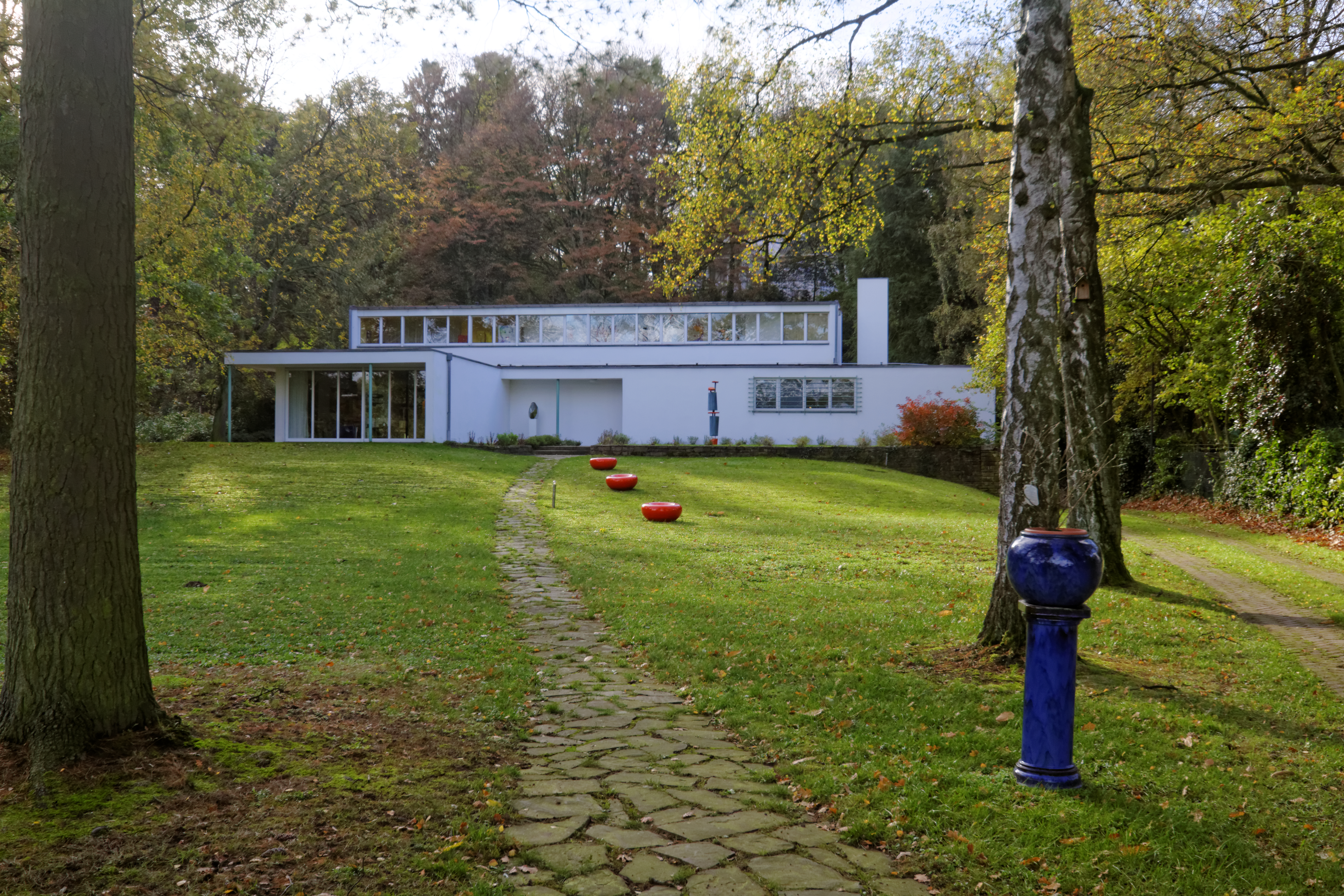 Krefeld, Talring 153; Haus Heusgen; Architekt: Rudolf Wettstein & Willi Kaiser